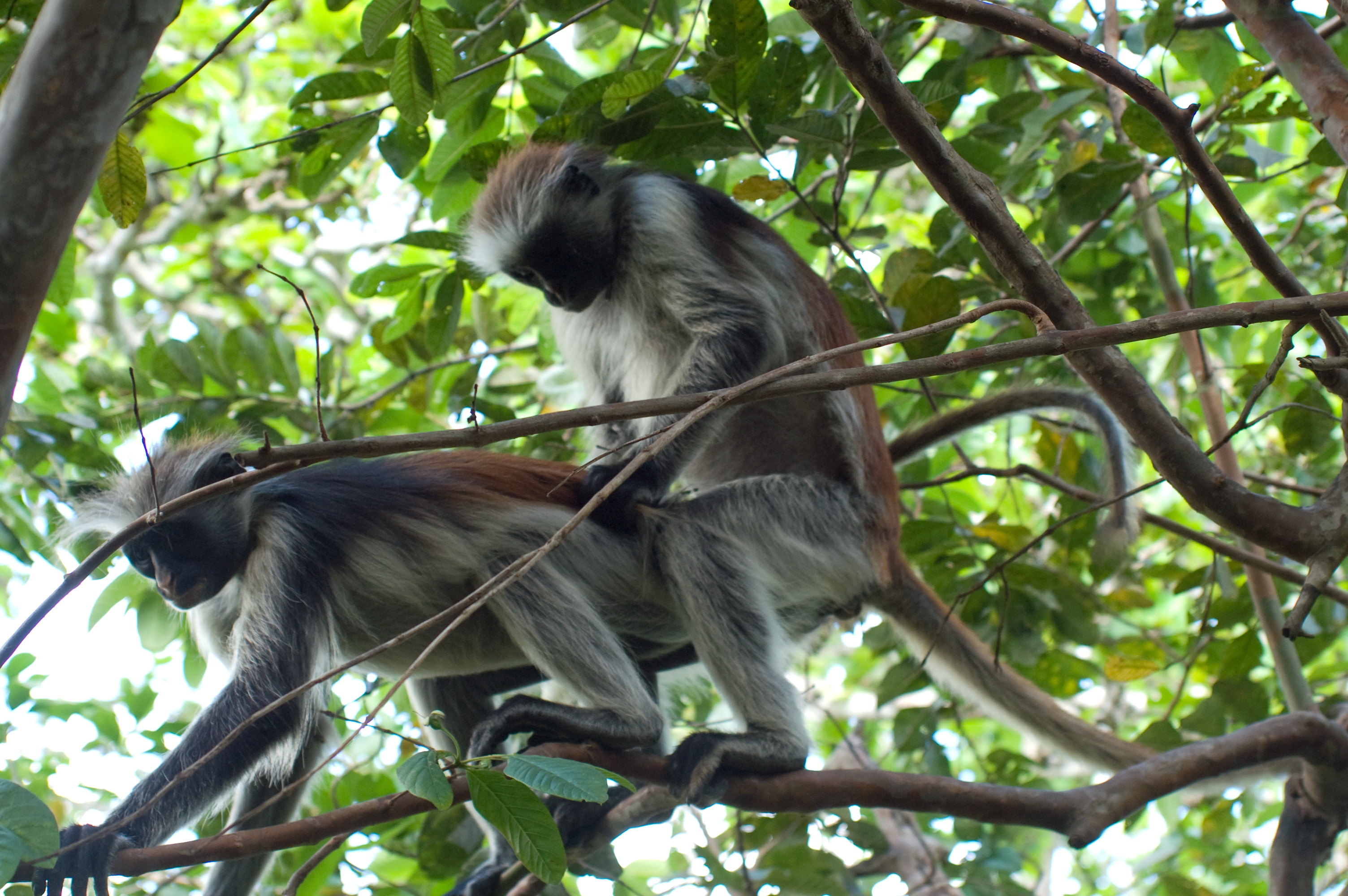 Zanzibar Red colobus mating, Zanzibar.